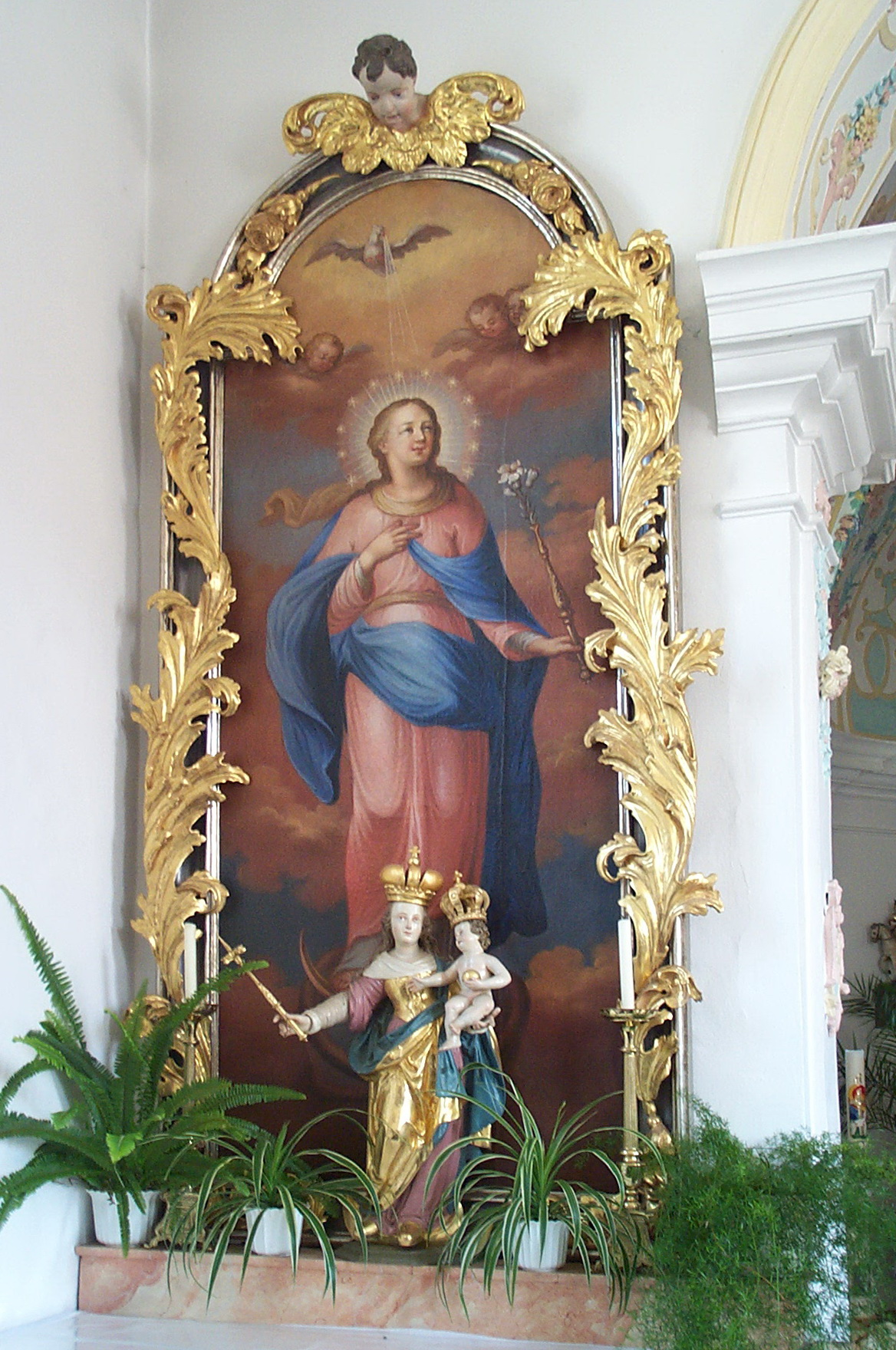 Herrngiesdorf, Bernhardstraße 23-25. Katholische Kirche St. Martin. Der linker Seitenaltar wurde im Jahr 1700 in Landshut hergestellt. Auf dem mit großblätterigem Akanthus um gebenen Bild wird Maria als Immaculata dargesellt. Auf dem Altartisch ist kleine Madonnenfigur mit Jesuskind um 1700 aufgestellt.